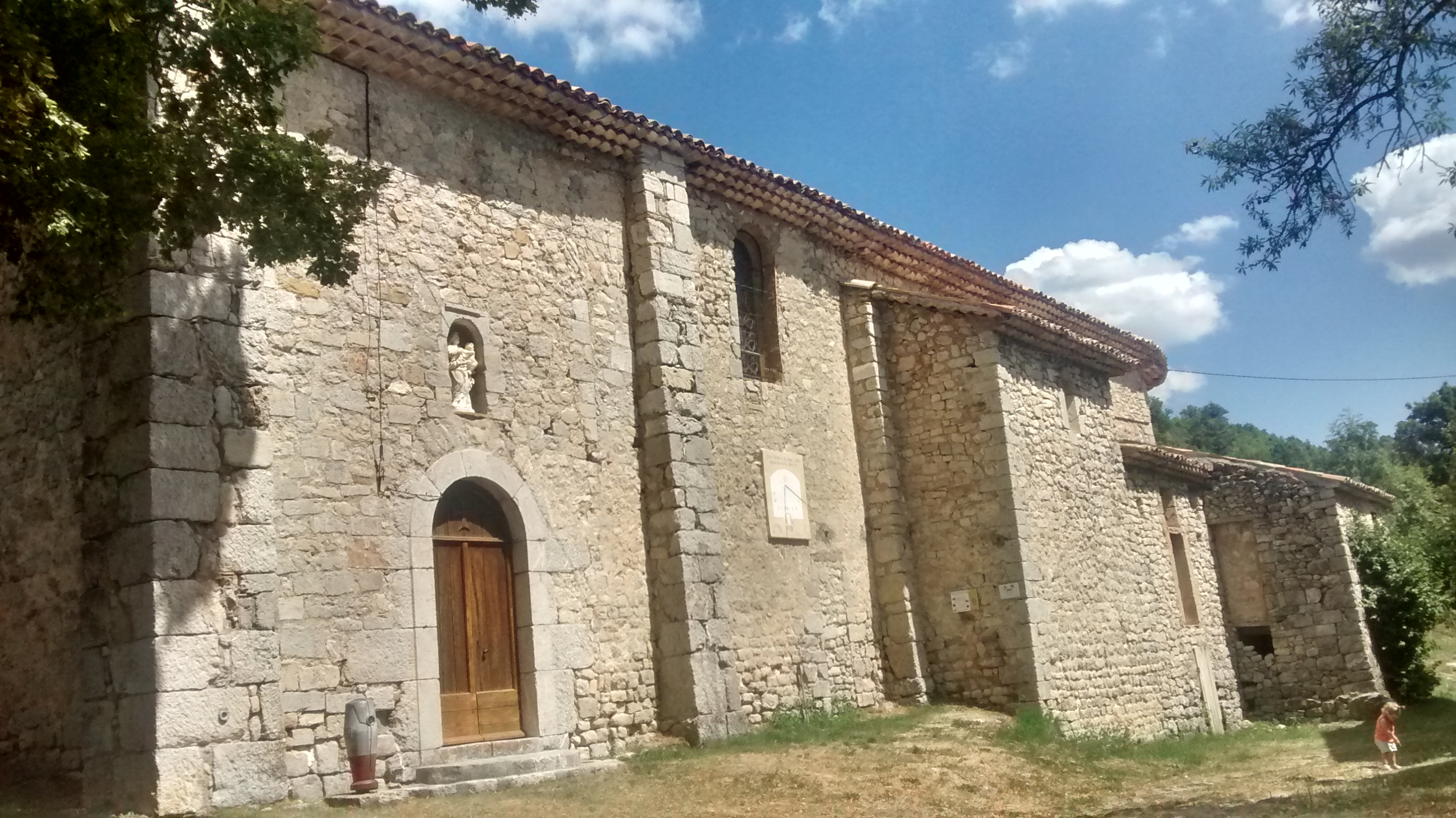 église Saint-Symphorien à Blieux